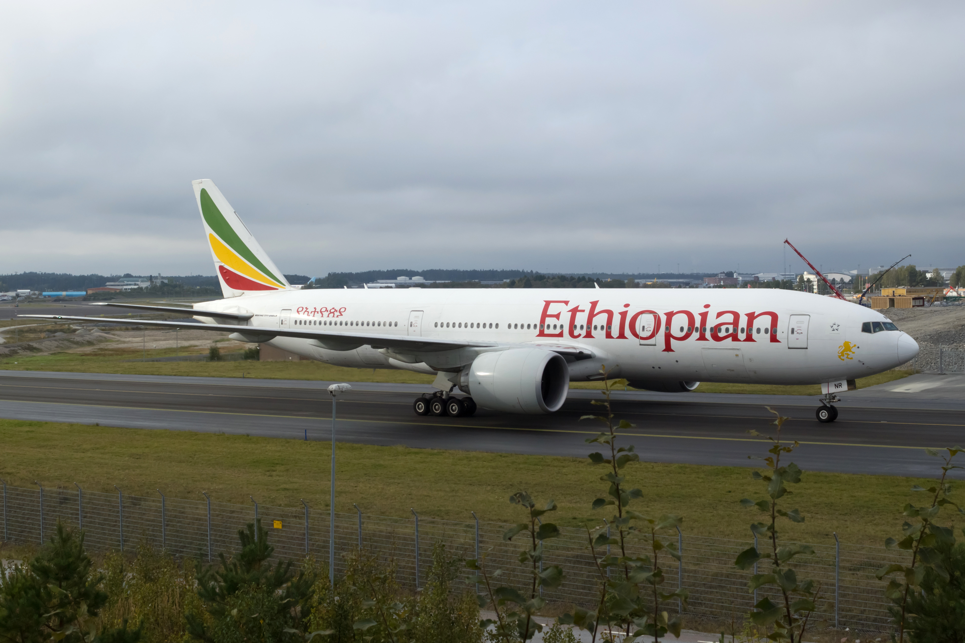 Boeing 777 de Ethiopian no aeroporto de Estocolmo-Arlanda.